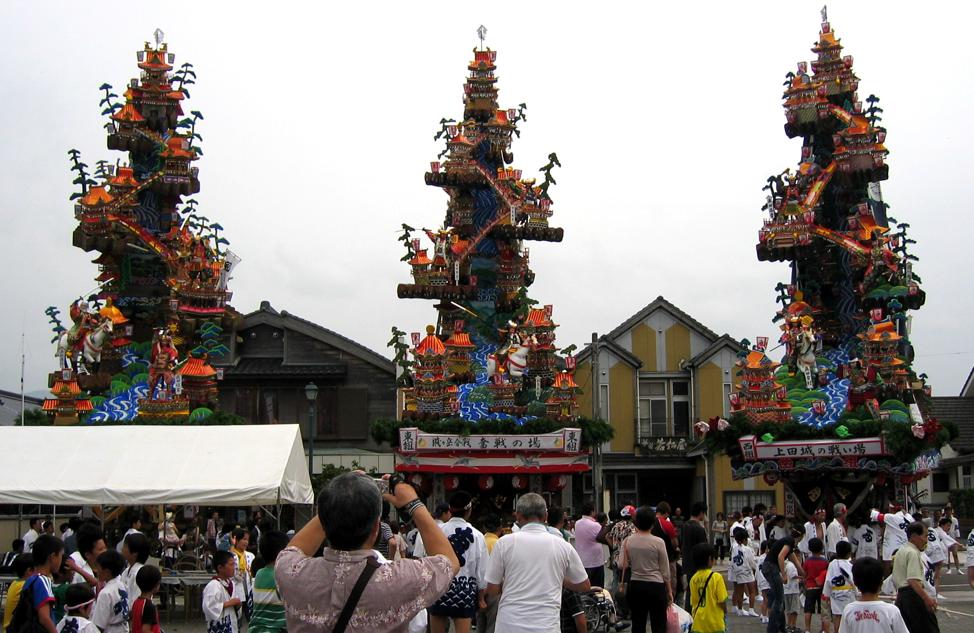 Hamasaki Gion Yamakasa(浜崎祇園山笠), saga, Japan.